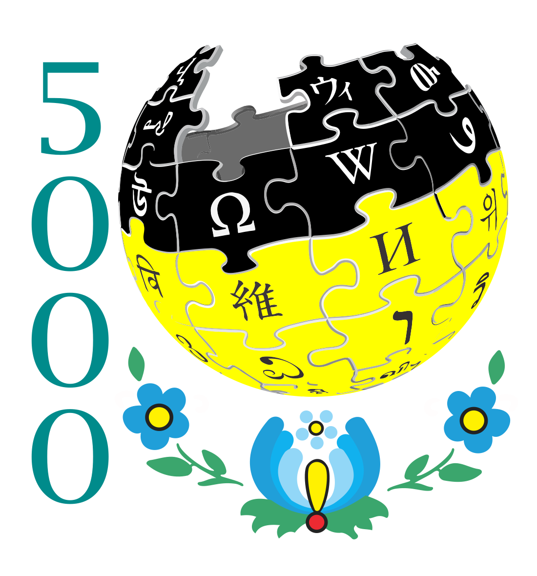 Okolicznościowe logo dla kaszubskiej Wikipedii z okazji napisania pięciu tysięcy artykułów.